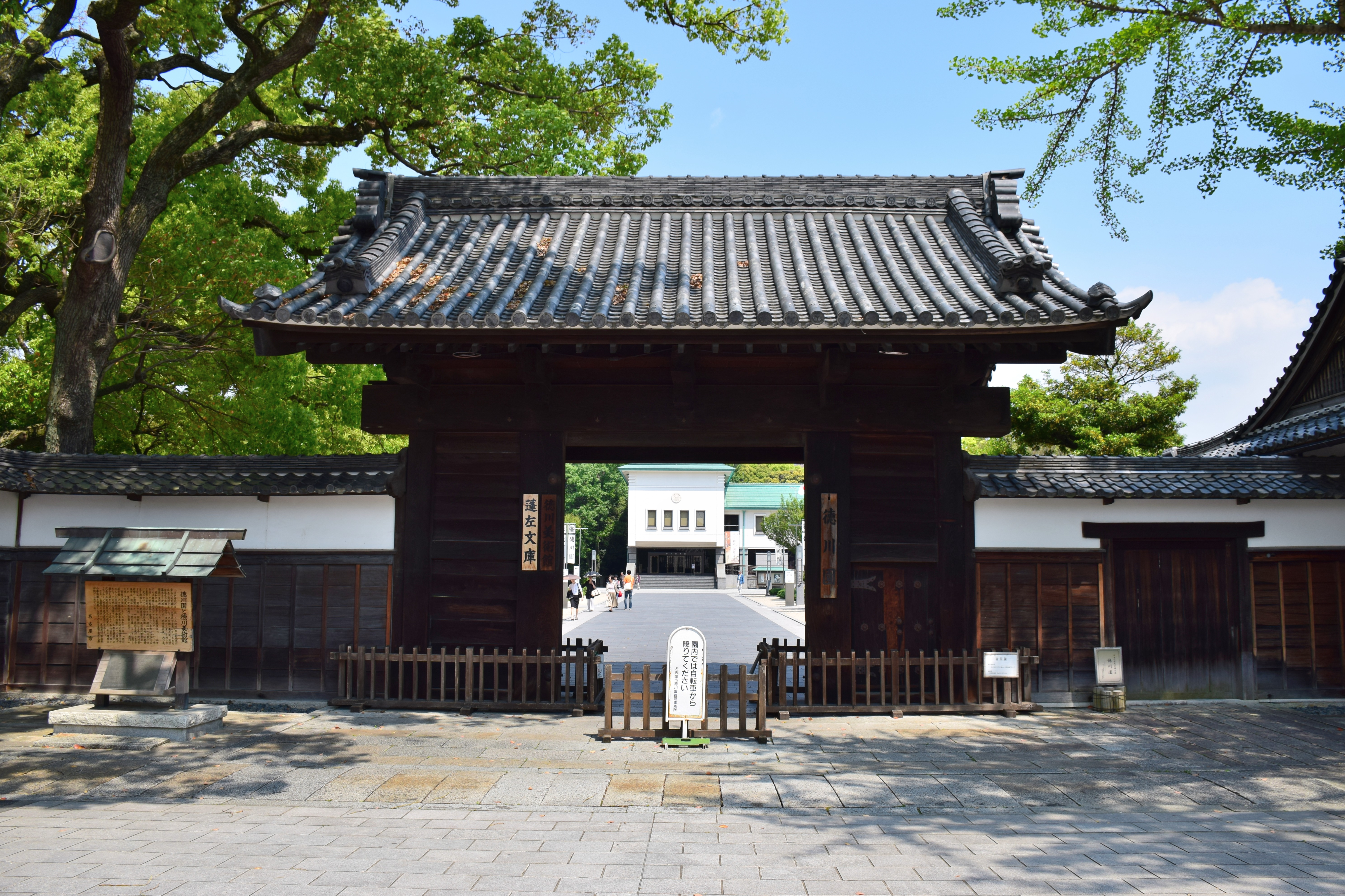 徳川園黒門